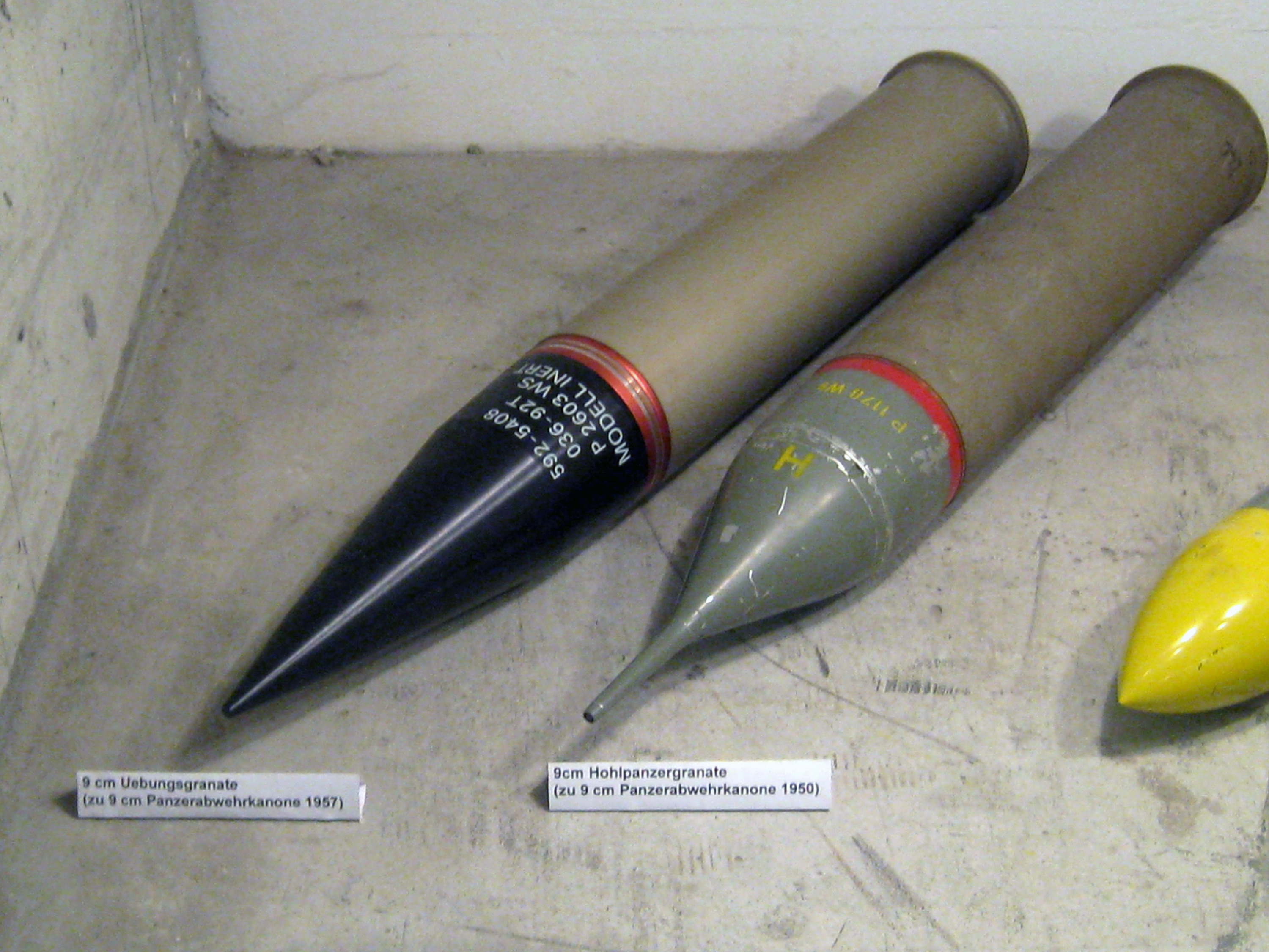 Munition Panzerabwehrkanonen im Festungsmuseum Reuenthal